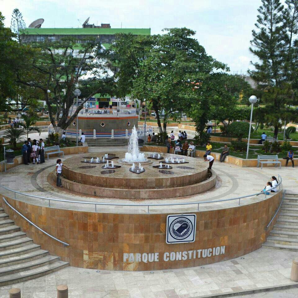 Parque constitución